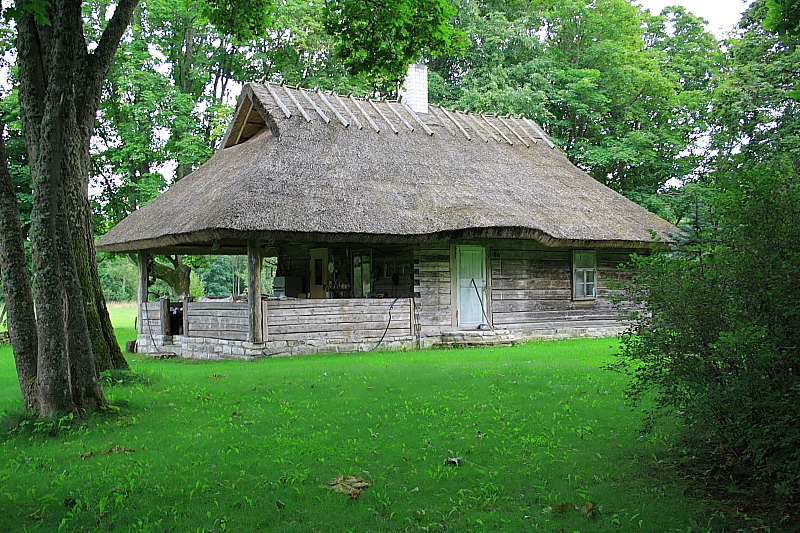 Kirjanik August Mälgu sünnikodu Lümanda vallas Saaremaal.